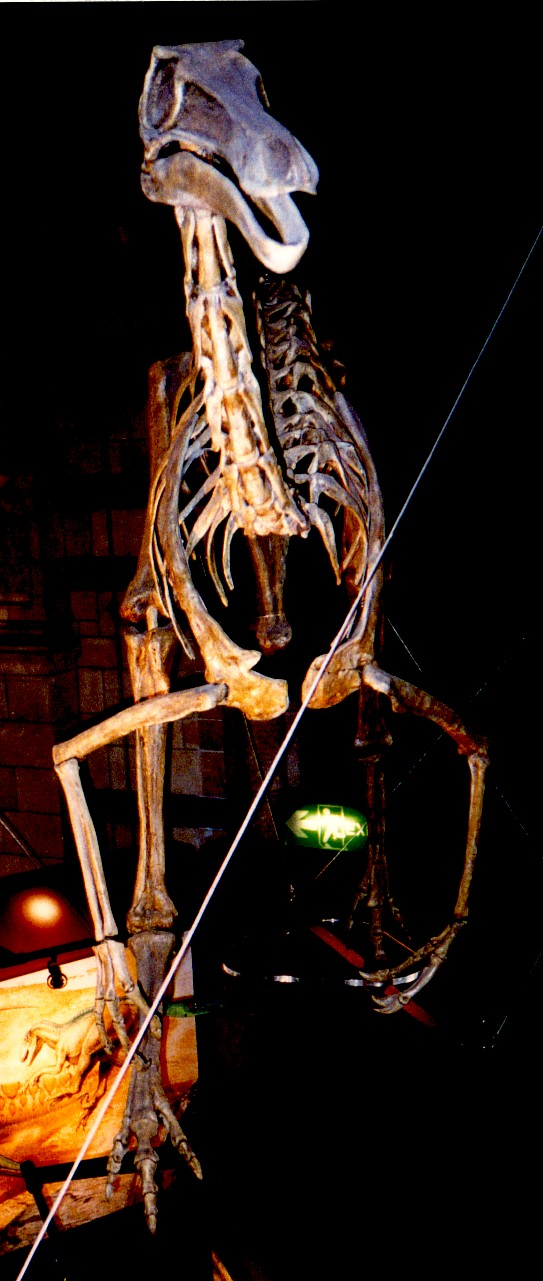 Gallimimus fotografiat al Museu d'Història Natural de Londres.